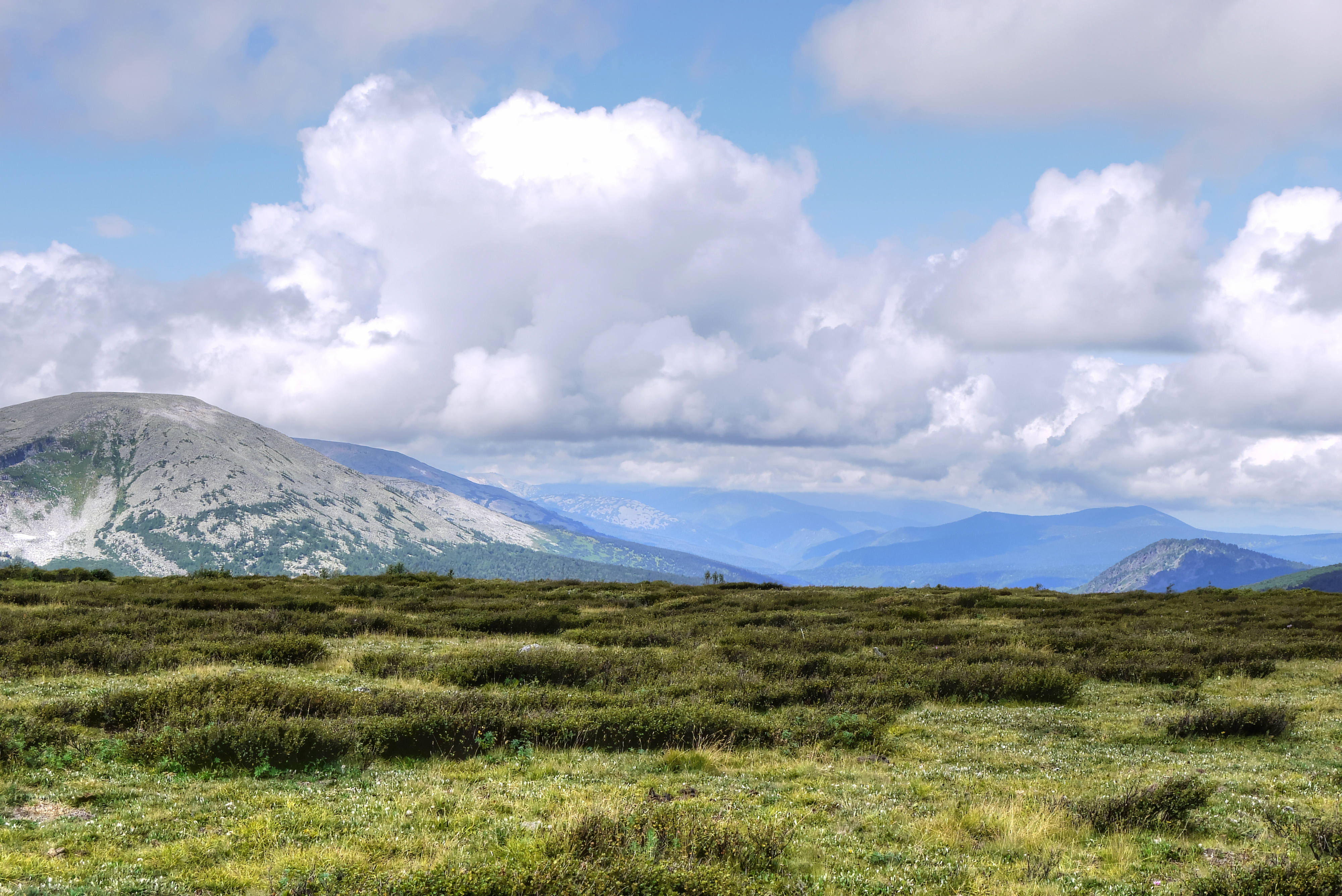 Чарышский заказник: Чарышский район, Алтайский край This image is related to the protected area of Russia number 2210206